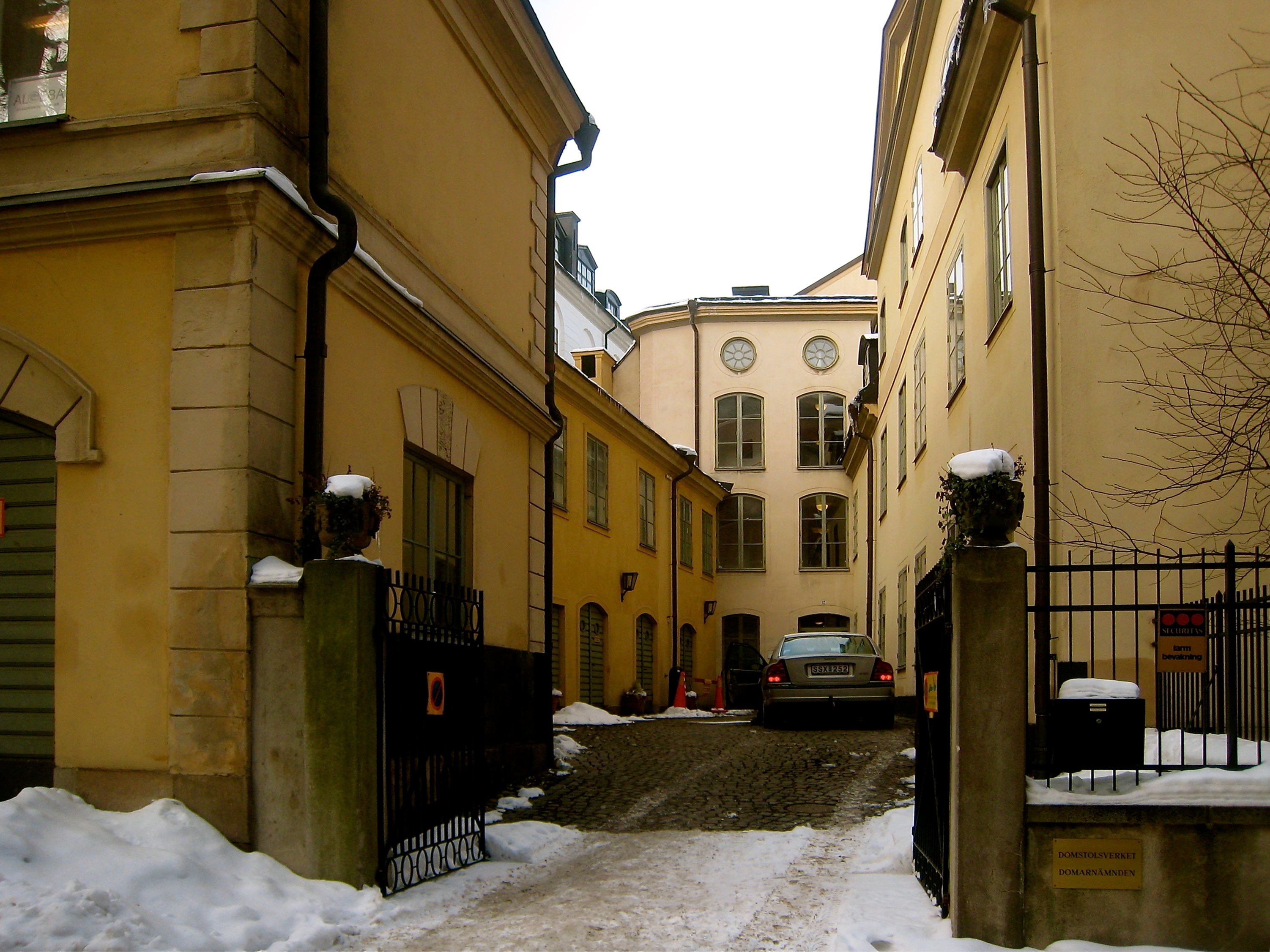 Fastigheten Gråmunkeholmen 4. På bilden den äldsta delen, med det bostadshus som uppfördes av Adolf Ludvig Levin.